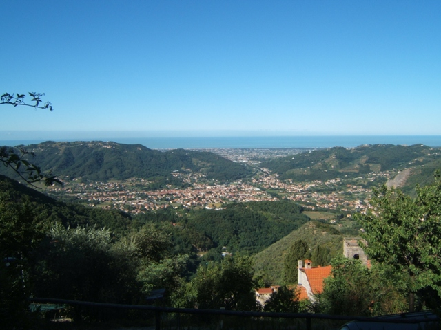 Blick von Metato nach Camaoire und auf das Meer